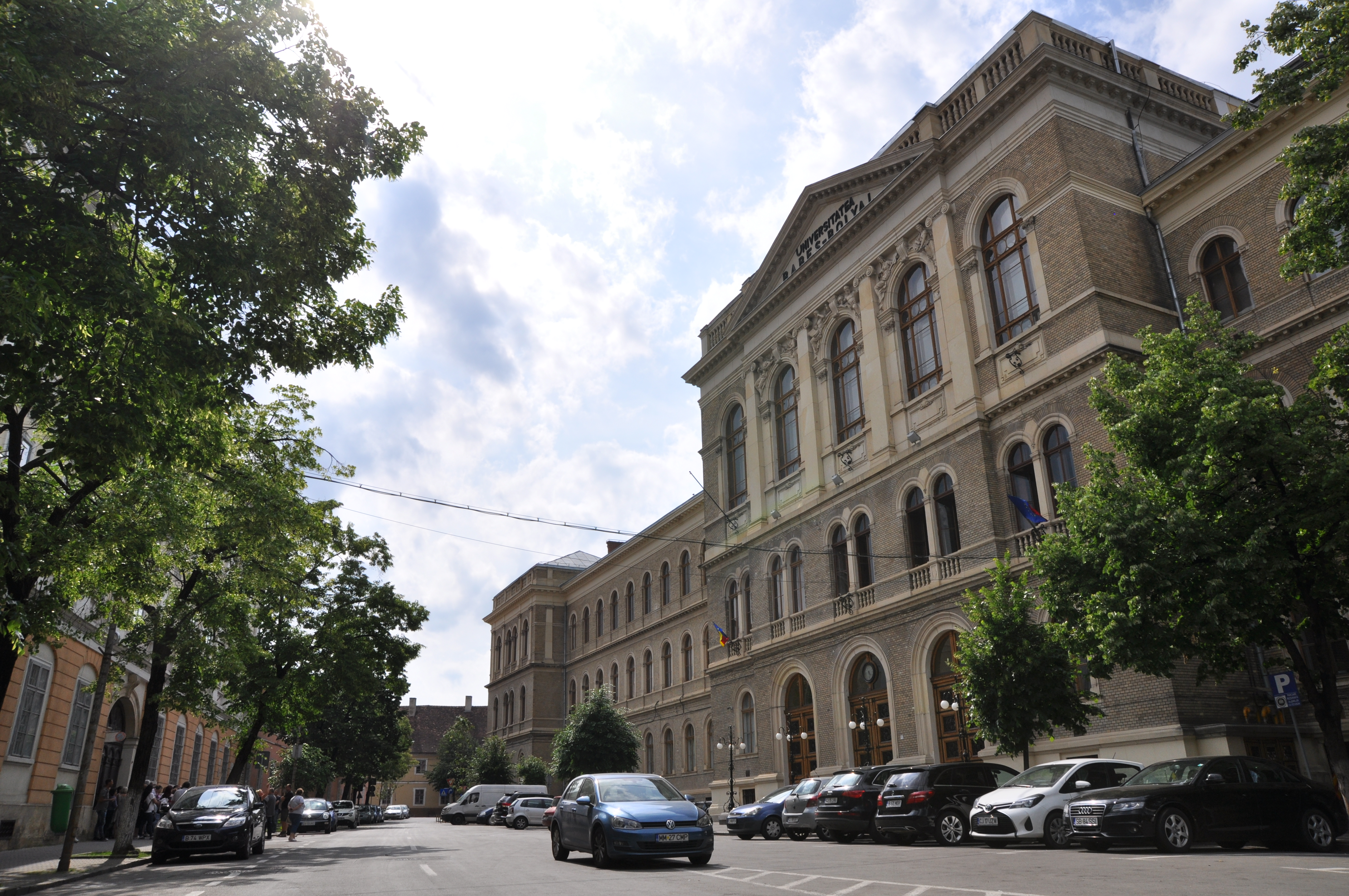 Kolozsvár, Babeș–Bolyai Tudományegyetem